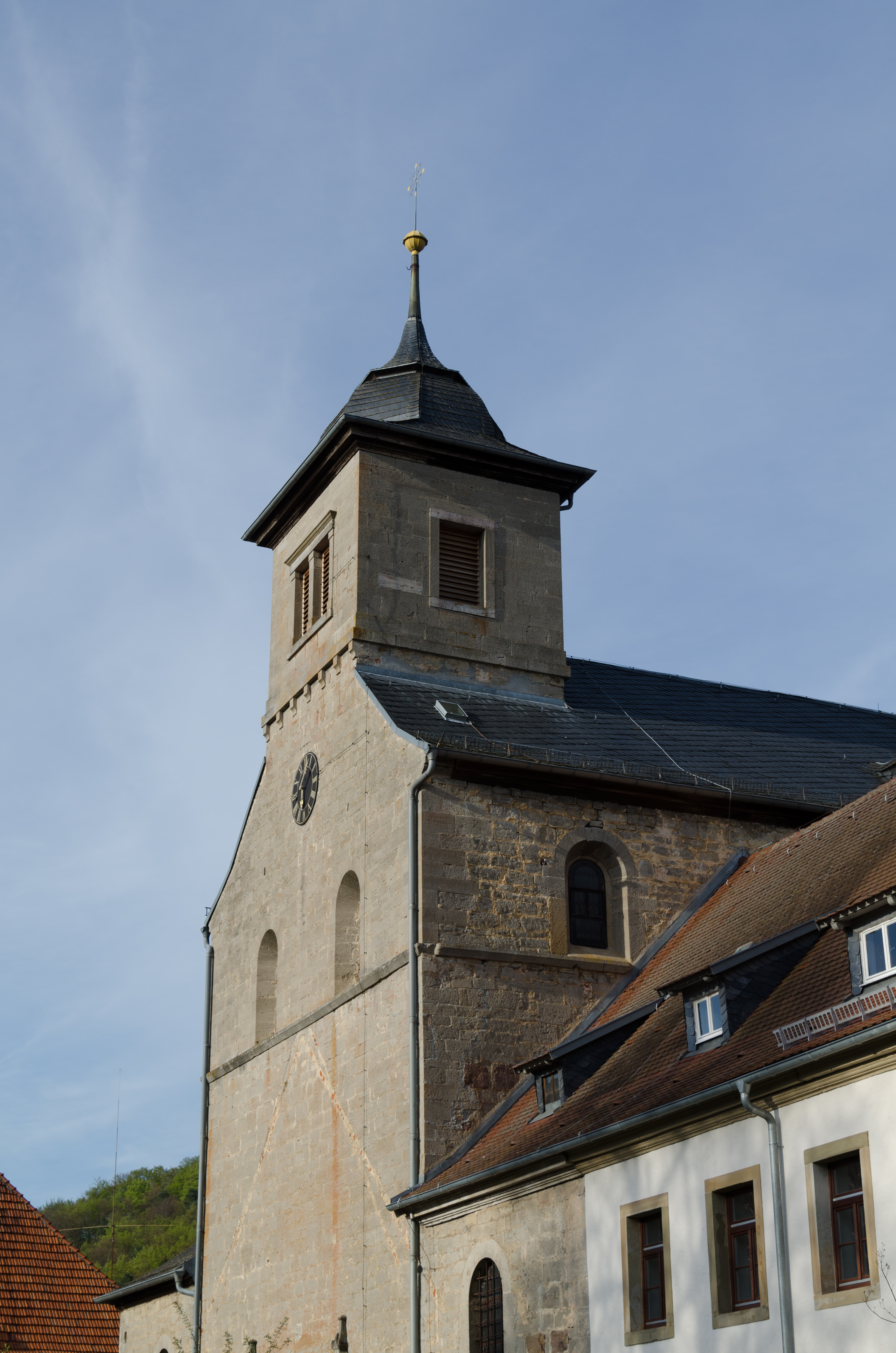 Kath. Pfarrkriche St. Cosmas und Damian in Wechterswinkel